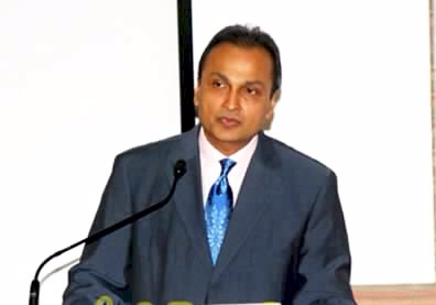 Anil Ambani at the launch of Kokilaben Dhirubhai Ambani Hospital